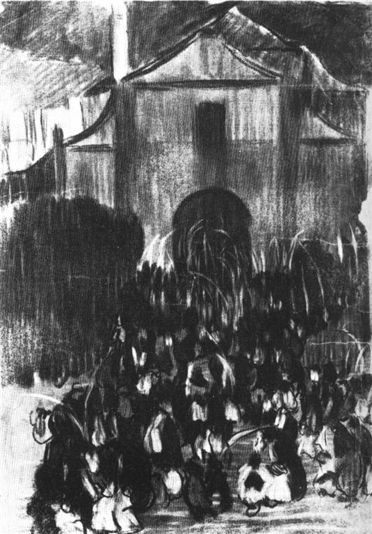 Manuel Ainaud Sanchez - carbó